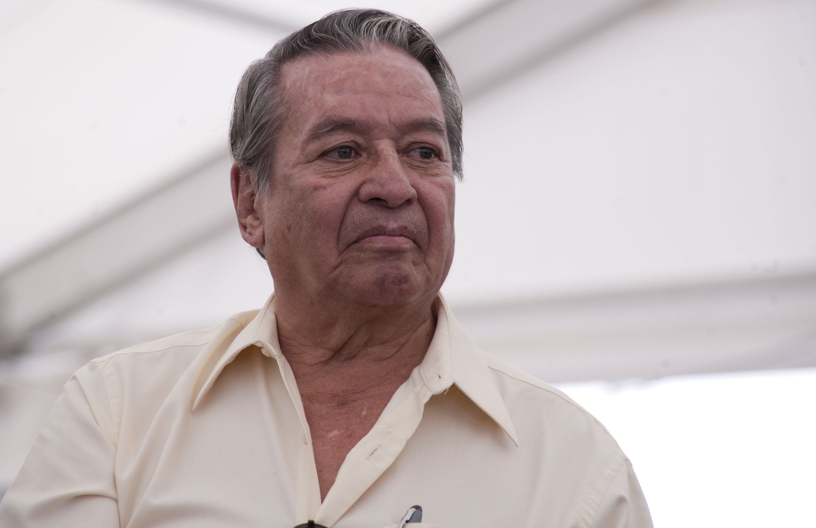 Domingo, 20 de Octubre 2013. Charla con los escritores José Agustín y Gerardo de la Torre en la XIII Feria Internacional del Libro del Zócalo de la Ciudad de Mexico. Foto: Abril Cabrera/Secretaria de Cultura